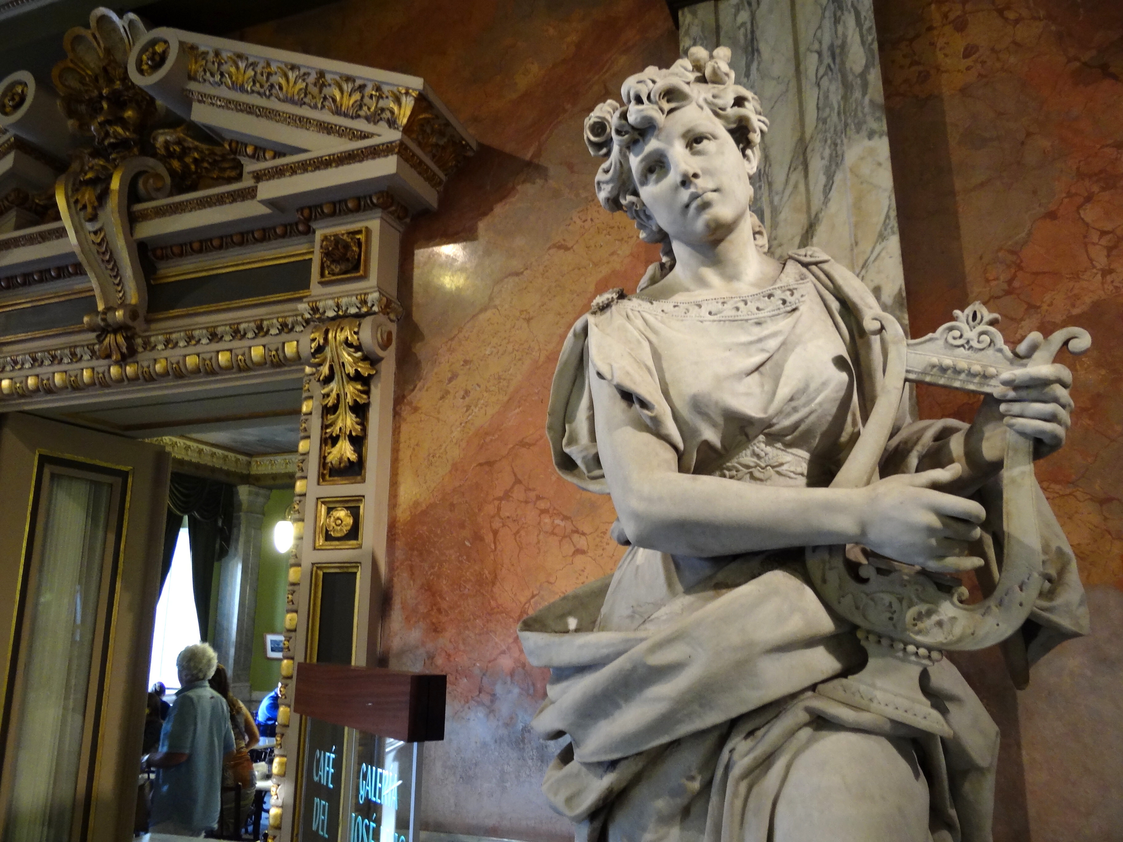 La Música, escultura de Adriático Foli (1897), custodia la entrada del café del Teatro Nacional de Costa Rica, San José.